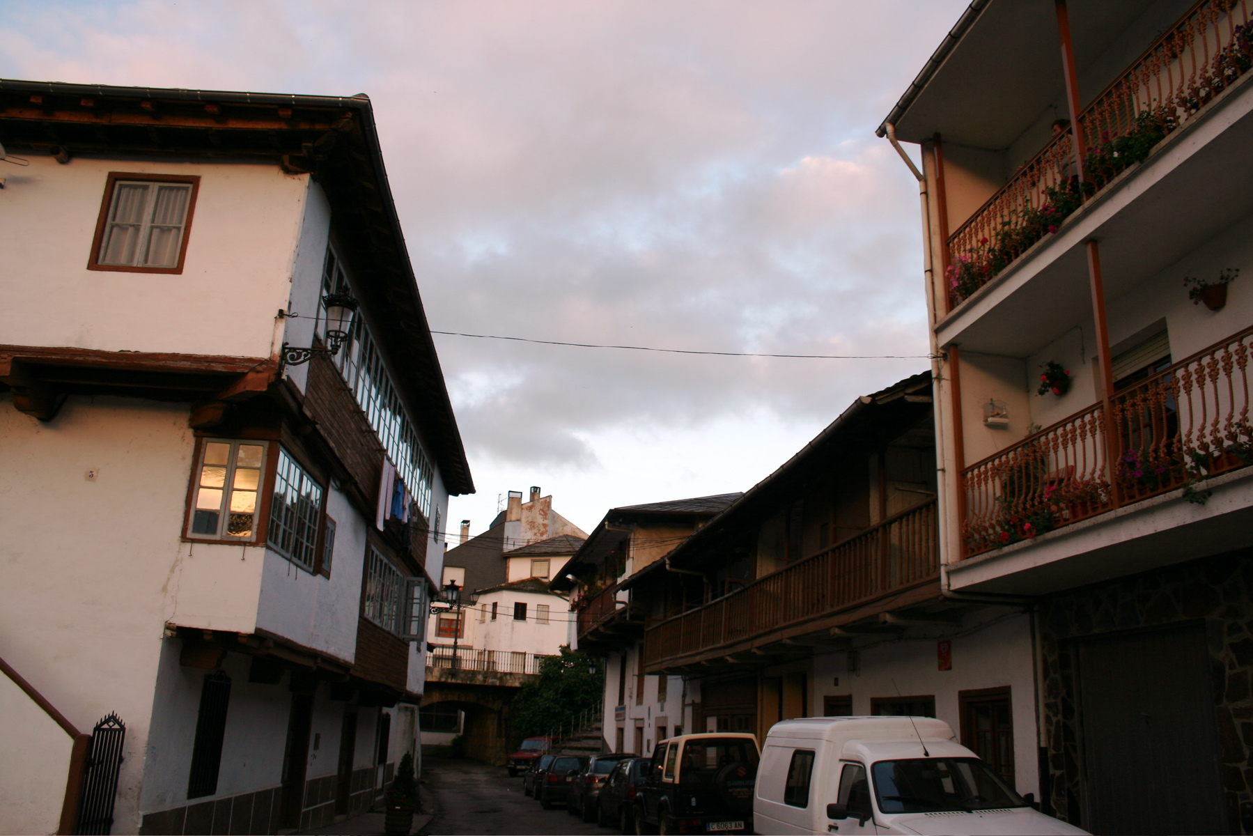 Navelgas